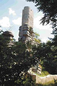 Weissenstein 2004